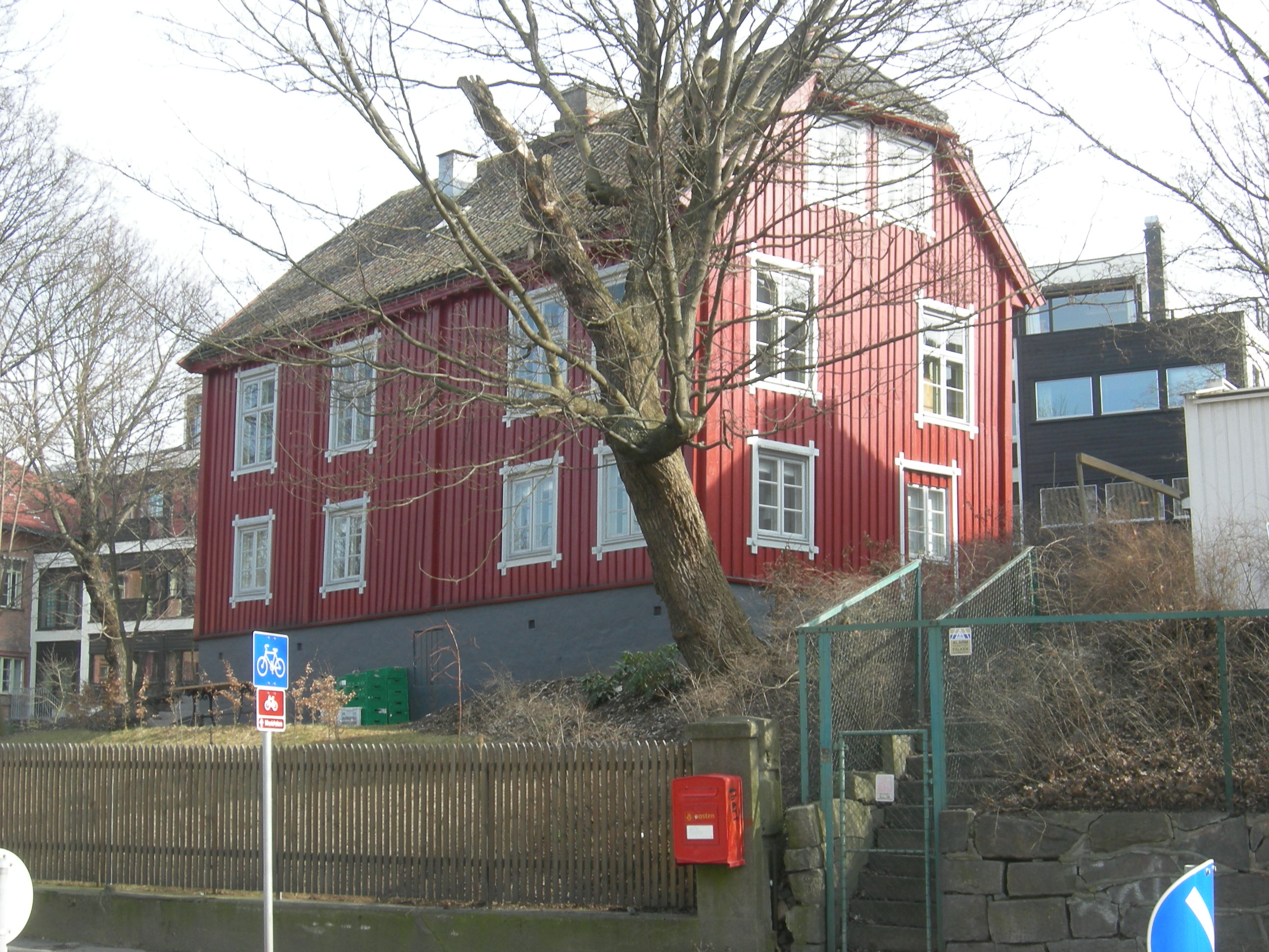 Løkkeberg, Lovisenberg neighbourhood, Oslo. Geitmyrsveien 67.